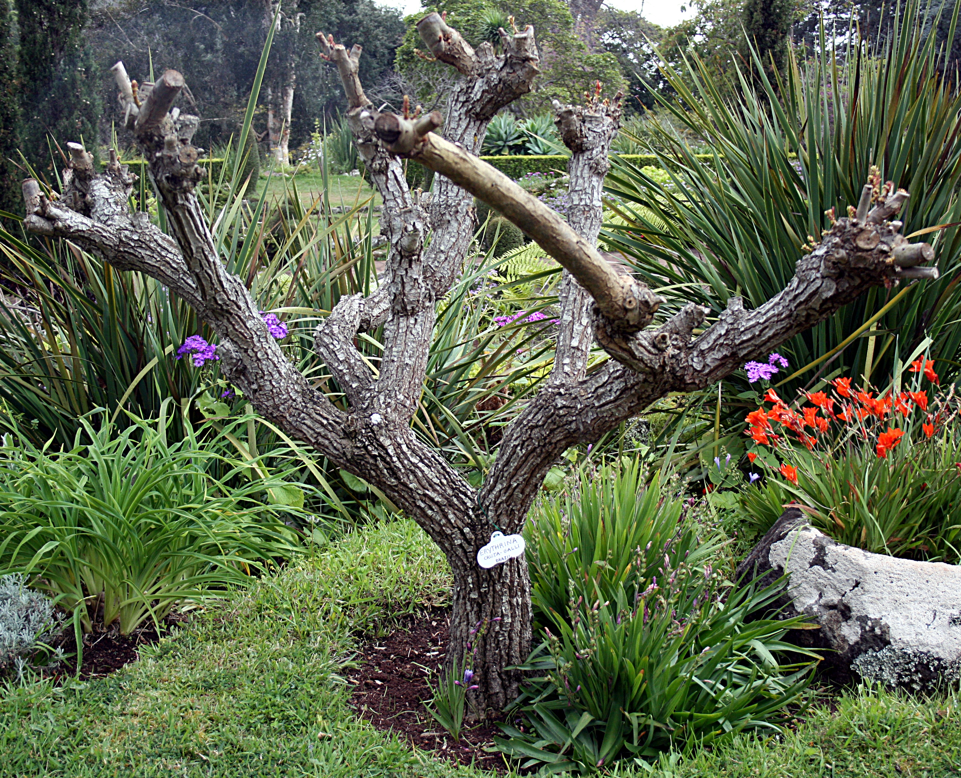 Madeira,_Palheiro_Gardens_-_Erythrina_crista-galli